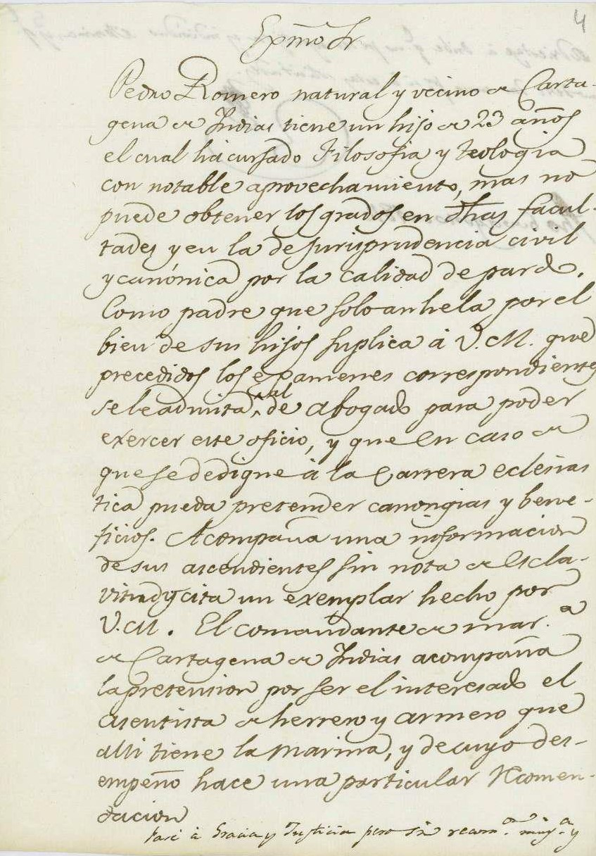 Biblioteca Virtual del Ministerio de defensa, Archivo General de Marina "Álvaro de Bazán", Sección: Expediciones, Sub-Sección: Expediciones a Indias, Asuntos particulares. Caja 46